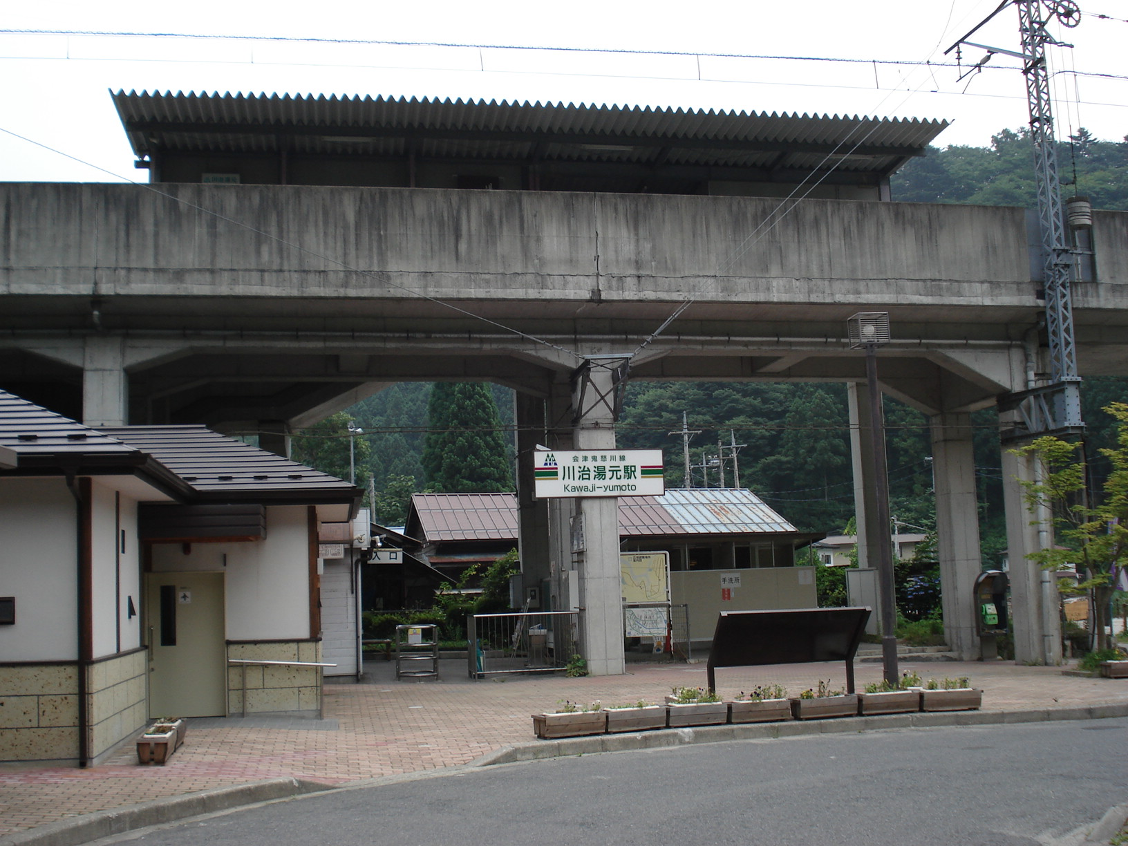 野岩鉄道会津鬼怒川線 川治湯元駅…栃木県日光市川治温泉川治字コケイト